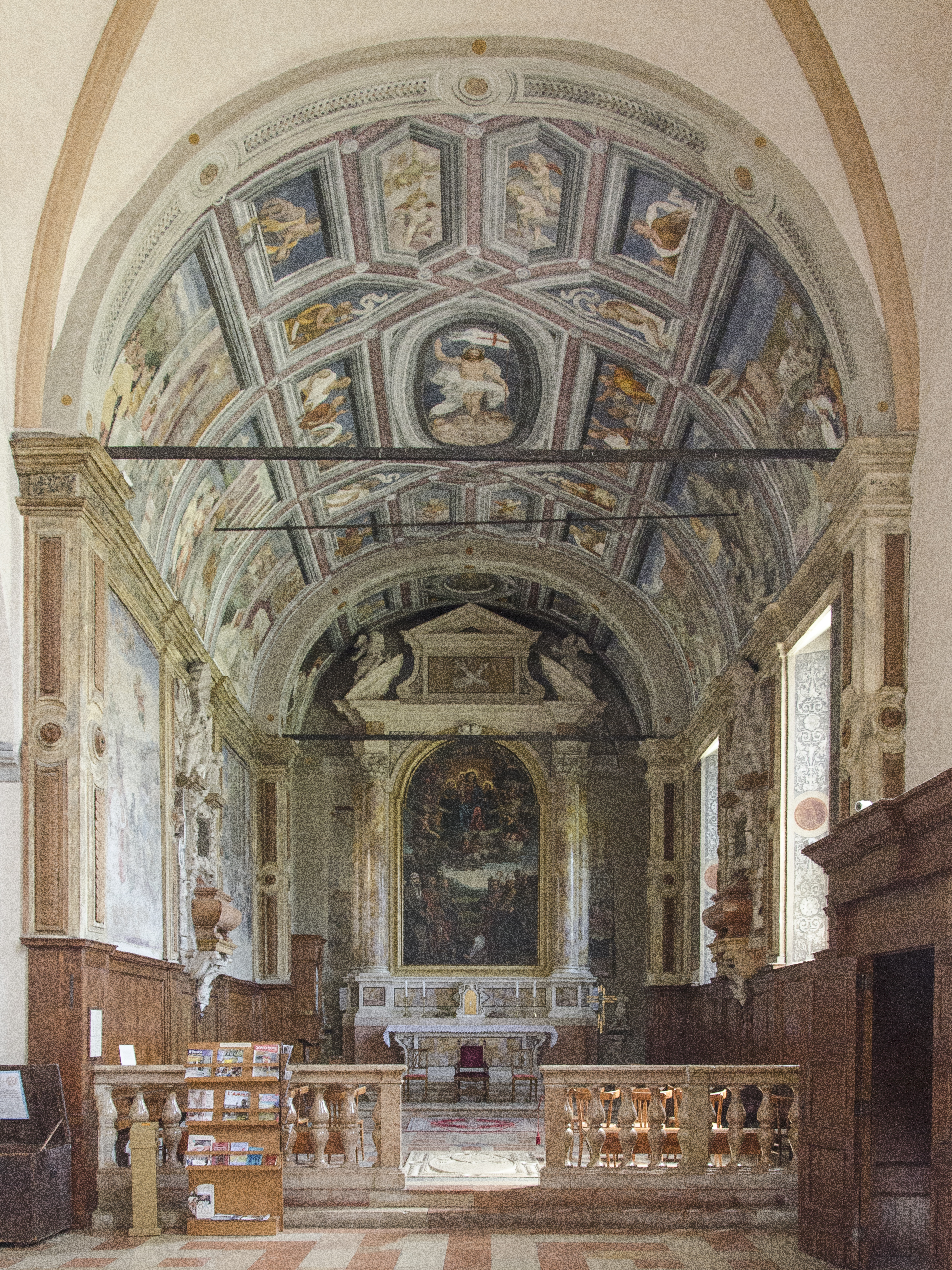 Chiesa di San Bernardino a Verona